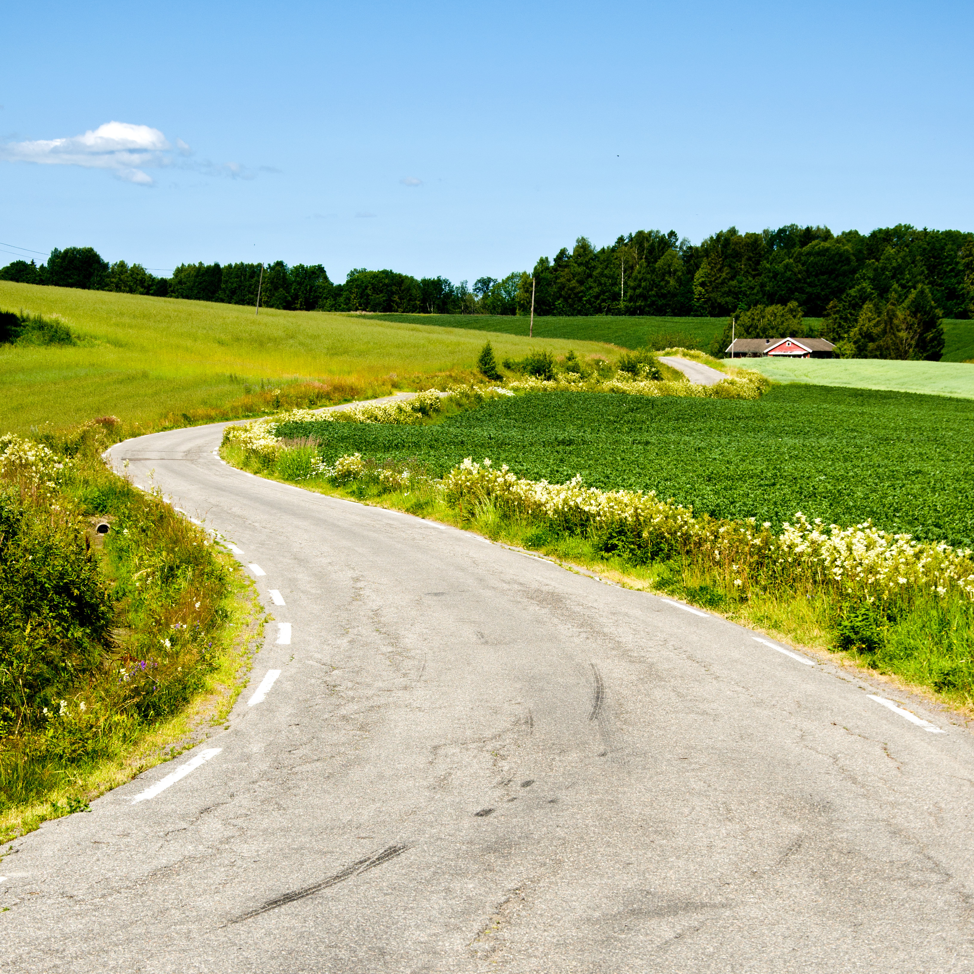 Fylkesvei 675 Bruserudveien i Re, Vestfold